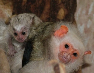 Ezüst selyemmajom kölykével a Szegedi Vadasparkban